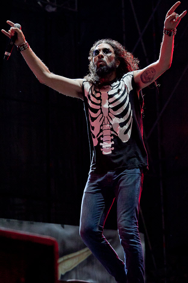 Claudio O'Connor, vocalista de Malón